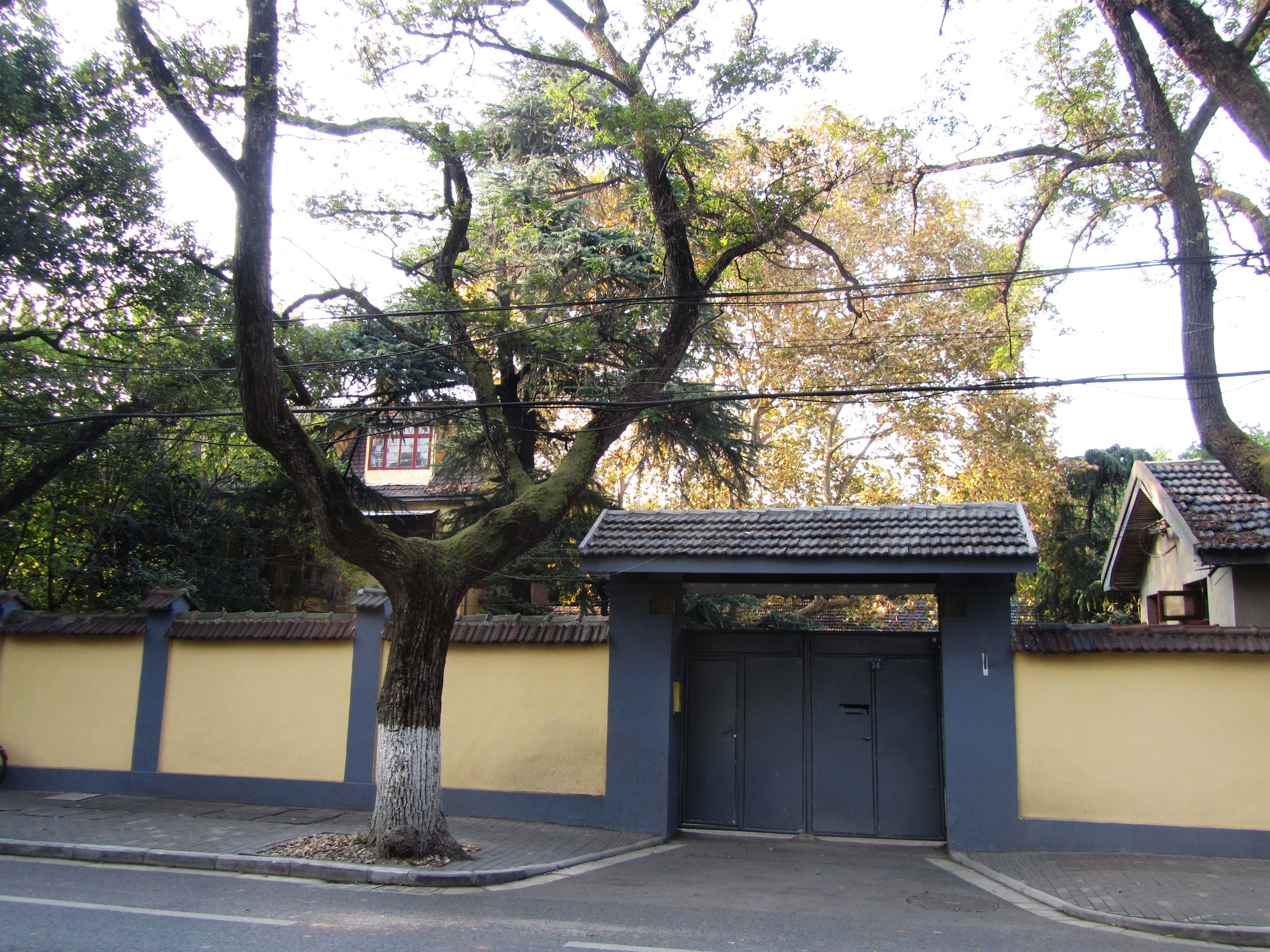 颐和路公馆区——颐和路34号民国建筑，原顾祝同公馆。